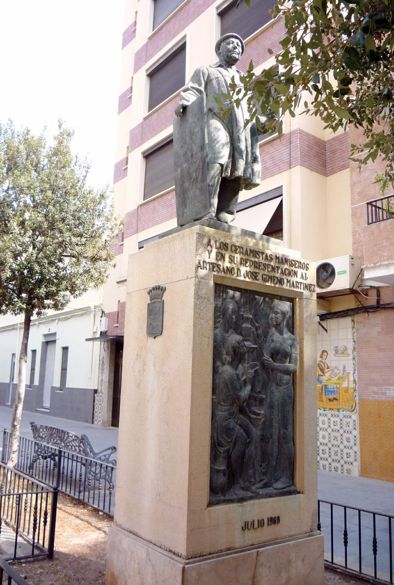 Monumento al ceramista manisero José Gimeno Martínez (Manises, Valencia)